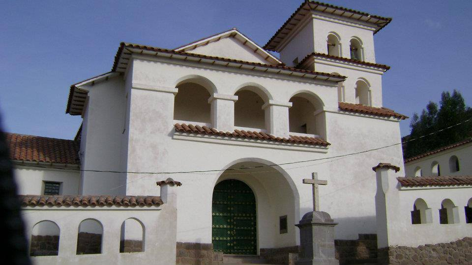 Surimana es Cuna de la Revolución de Latinoamerica